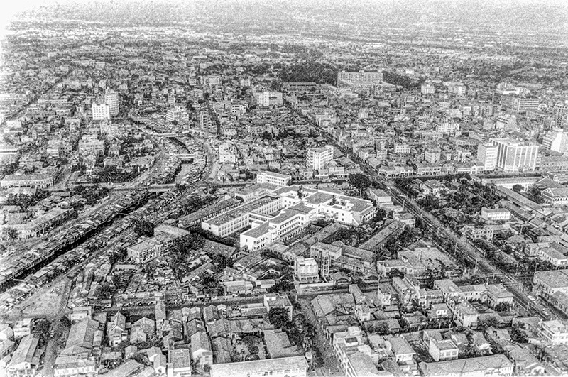 臺中市區空拍寫真。